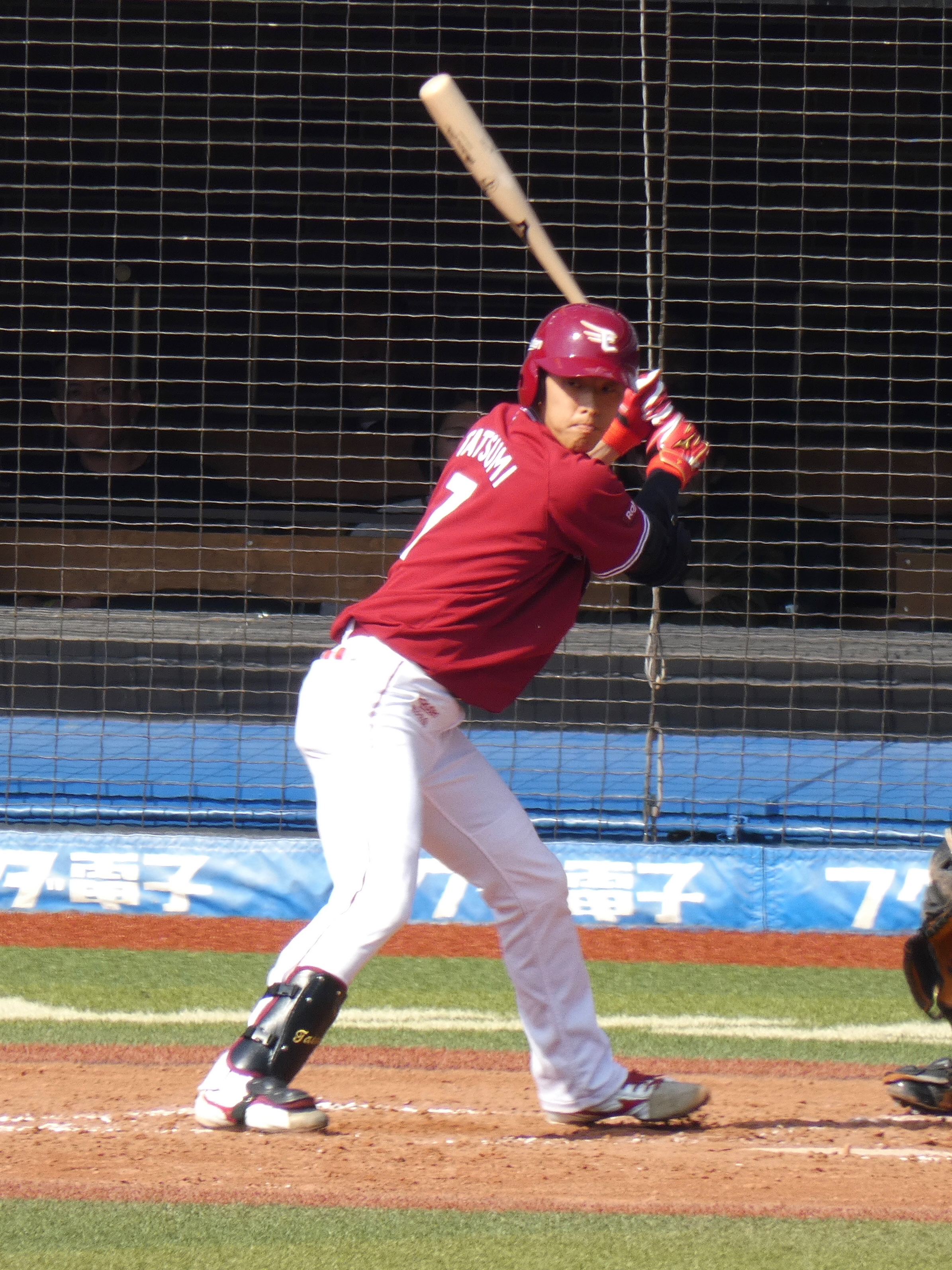 東北楽天ゴールデンイーグルスの選手「辰己涼介」。ZOZOマリンスタジアムにて。